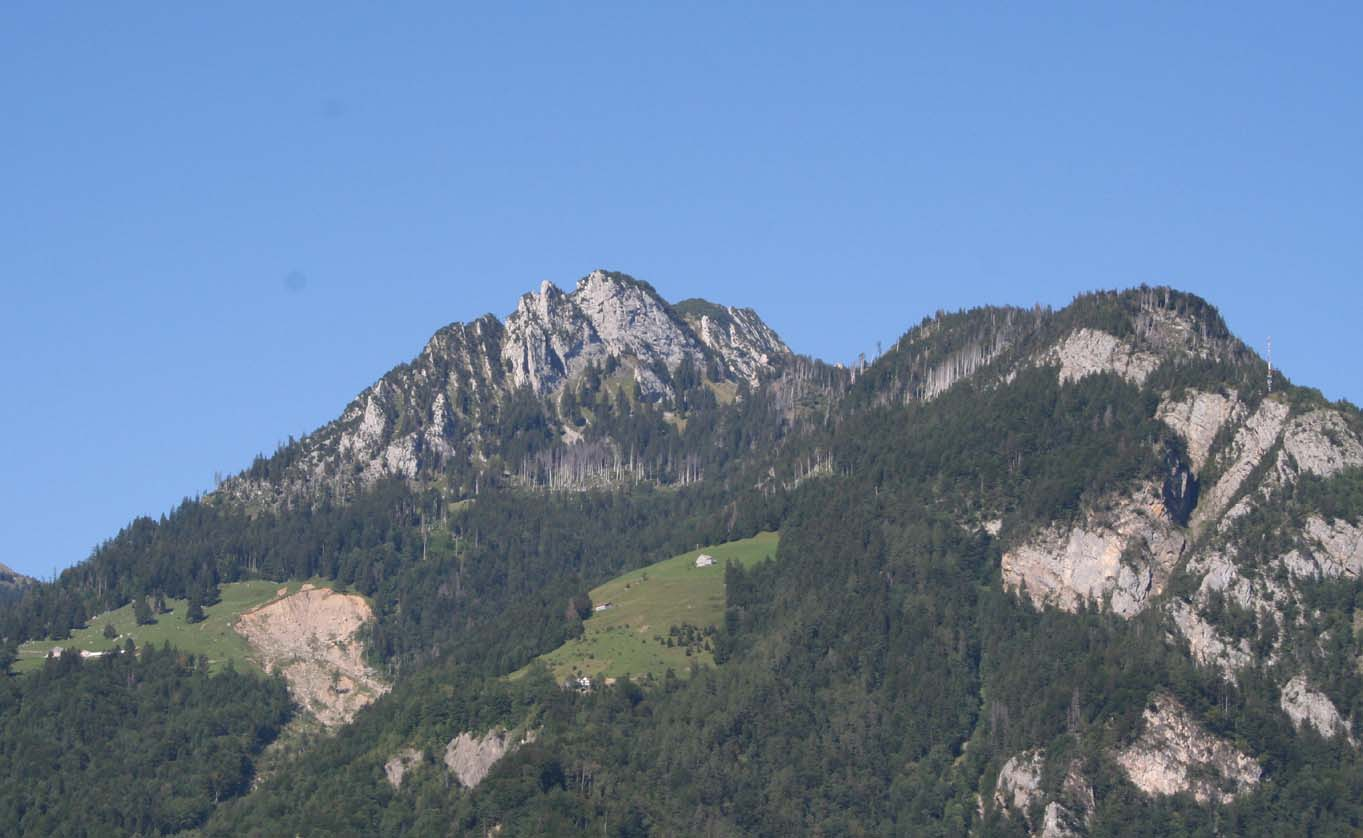 Mattstock